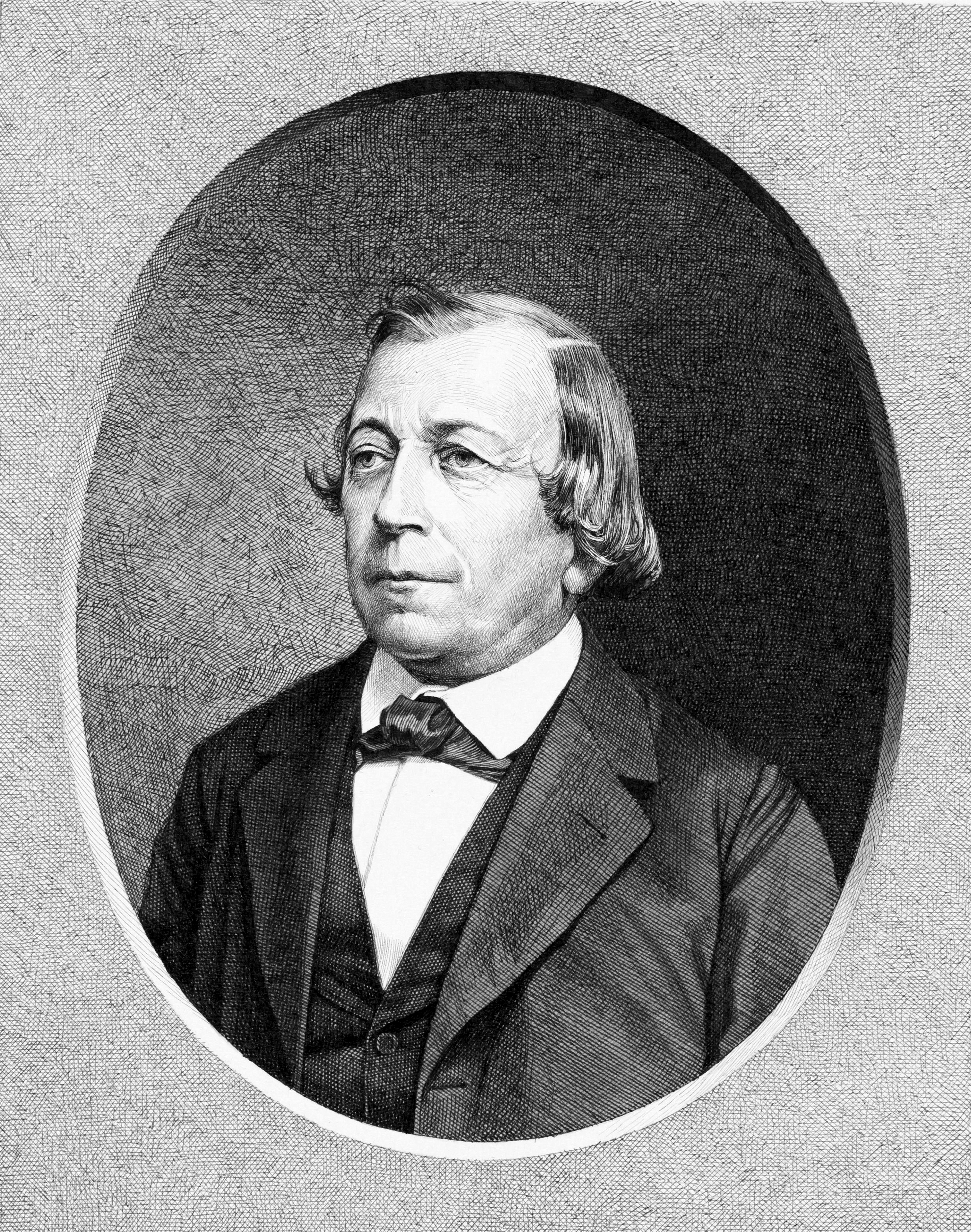 Leopold (Valentin) Schmidt (1824–1892), Professor für Klassische Philologie an der Universität Marburg. Federzeichnung, Bildfeld 15,7 × 12,6 cm, rückseitig signiert und datiert